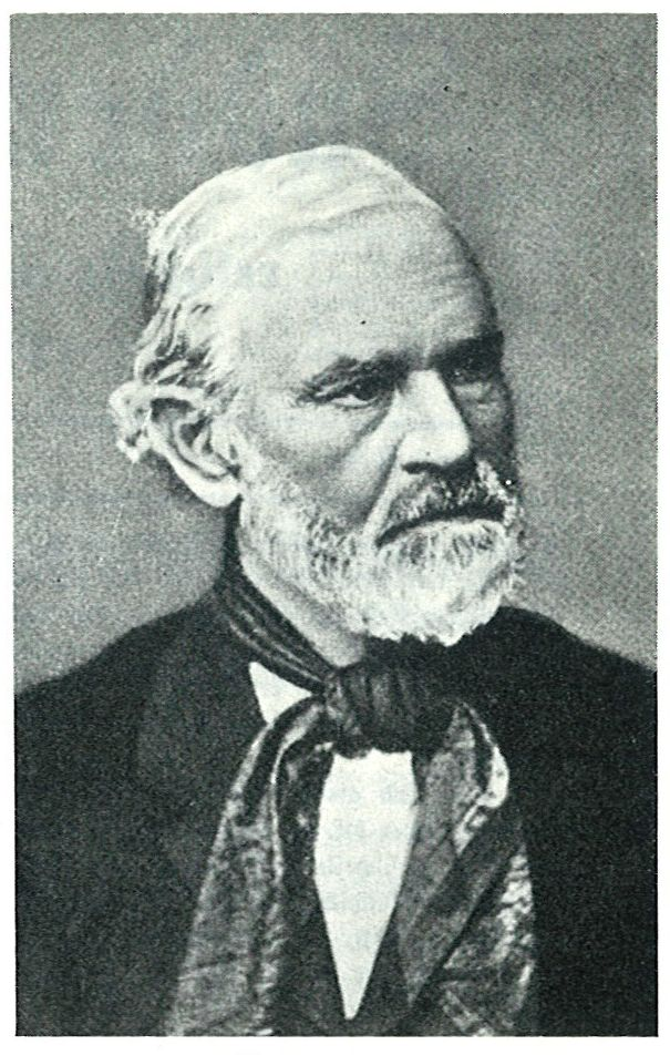 Template:Georg David Hardegg